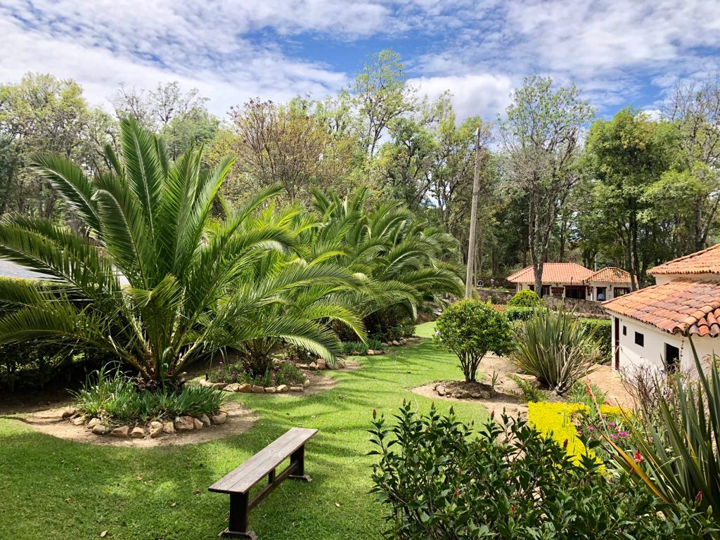 Vista general del paleojardín en el museo paleontológico de Villa de Leyva